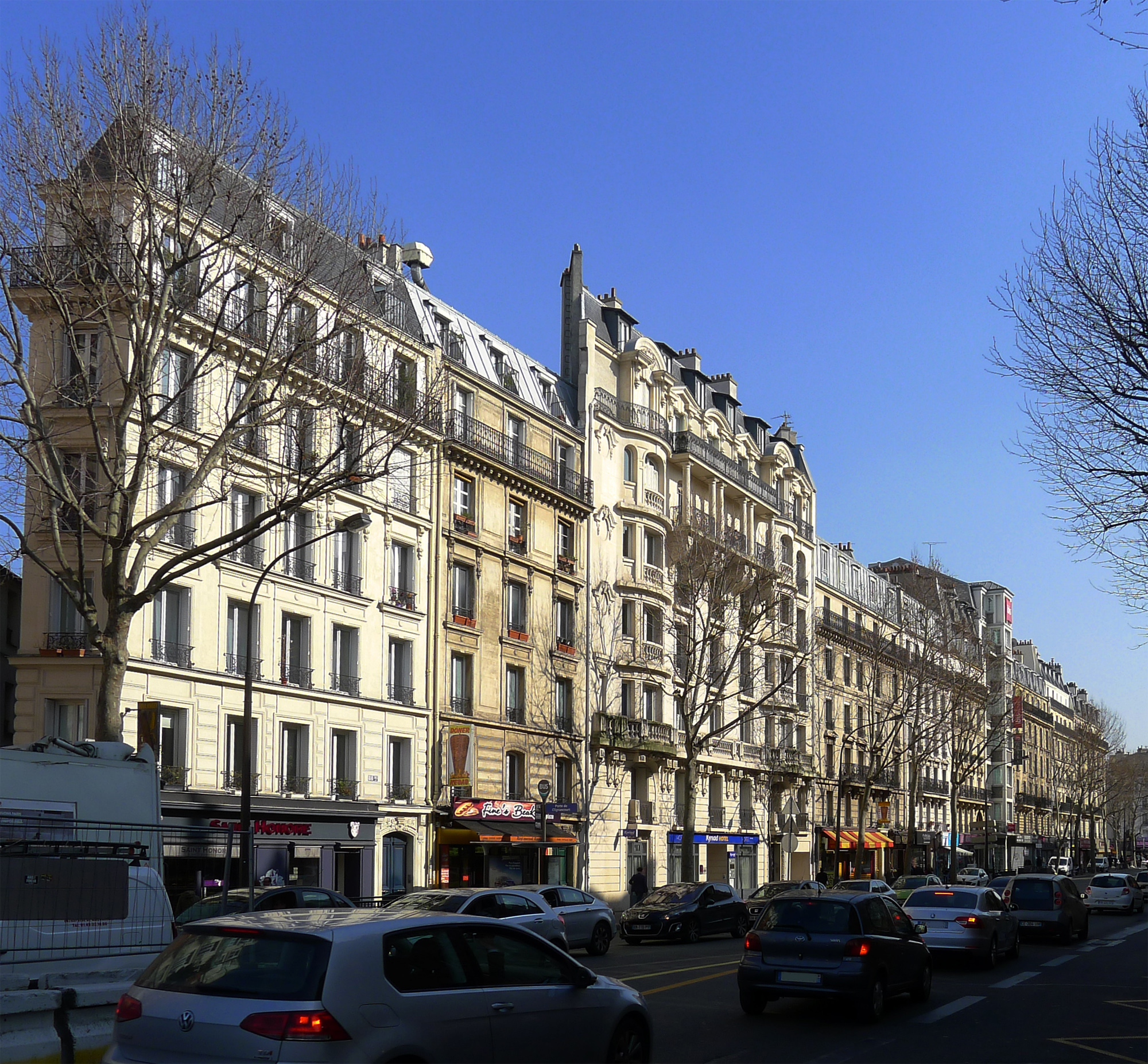 Boulevard Ornano (n° 78) - Paris XVIII